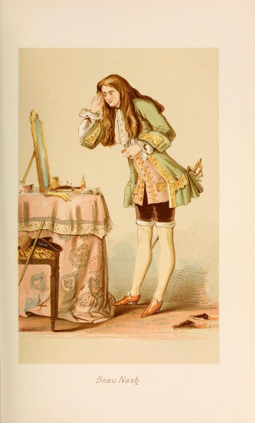 Illustration issue de "The life of George Brummell, esq., commonly called Beau Brummell " par Captain Jesse et représentant le dandy Beau Nash.